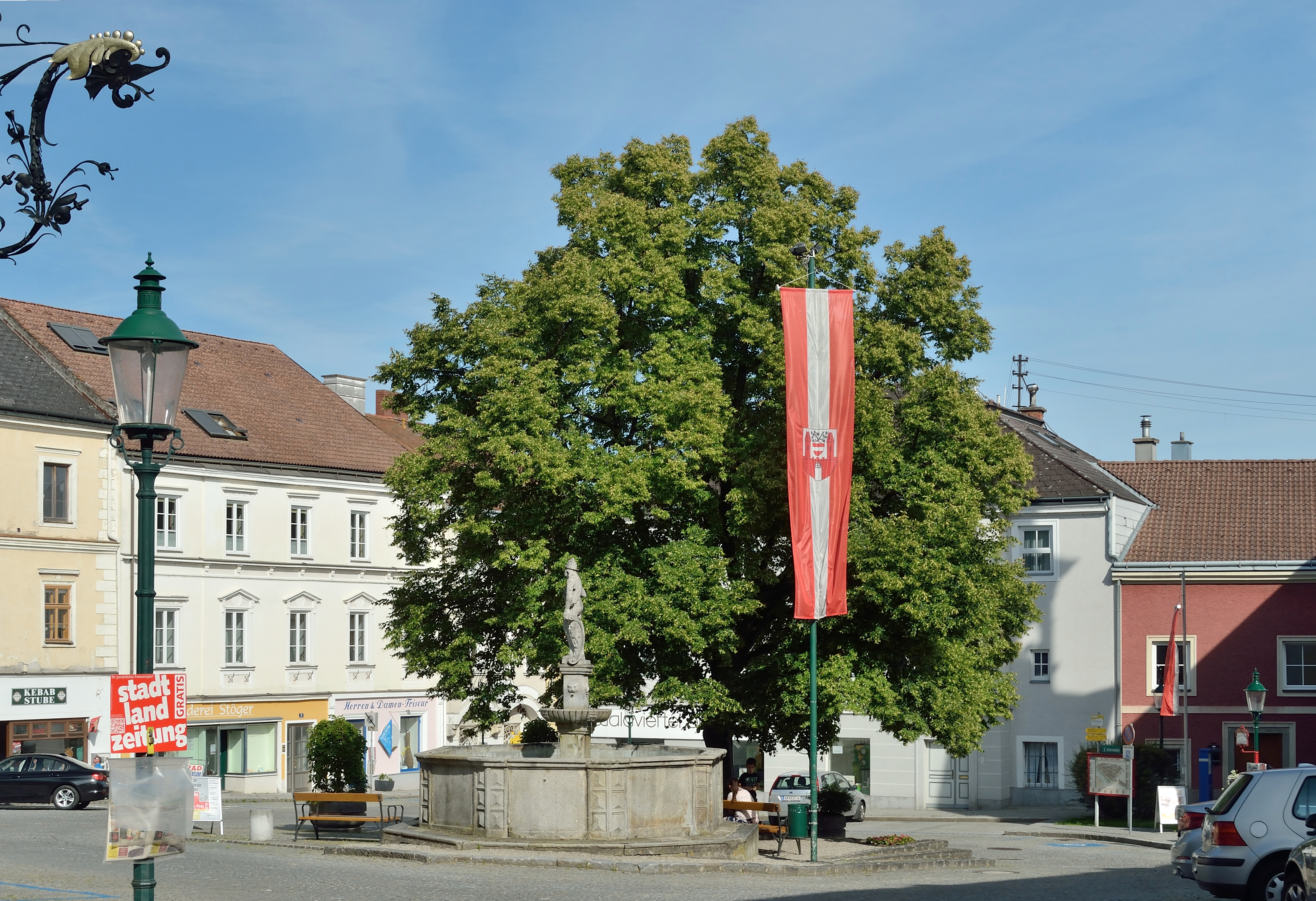 Der Hauptplatz von Ybbs an der Donau mit dem Brunnen und der Prangermandl-Statue.